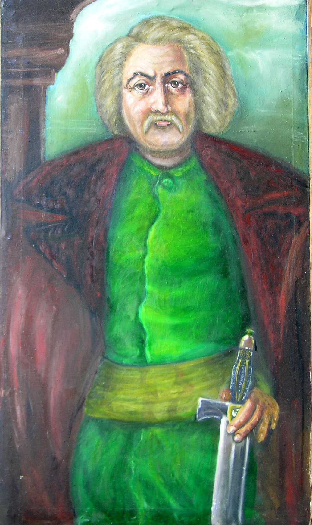 z galeri mojego malarstwa. autor Caption